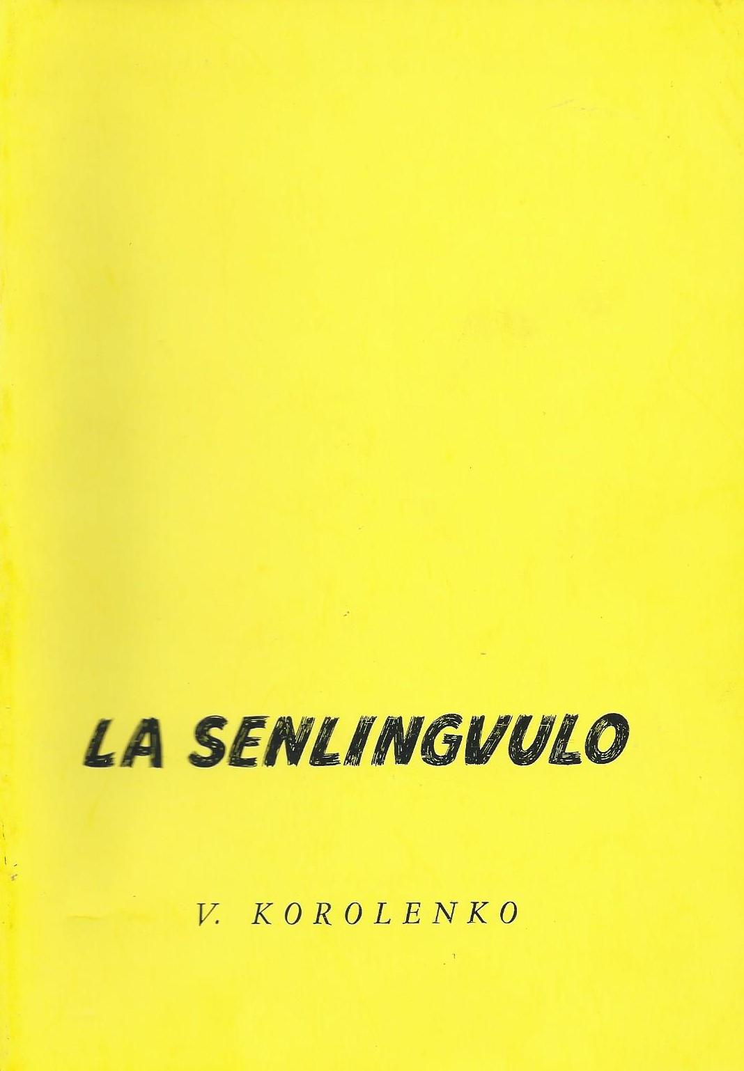 librokovrilo de libro "La Senlingvulo", 1976